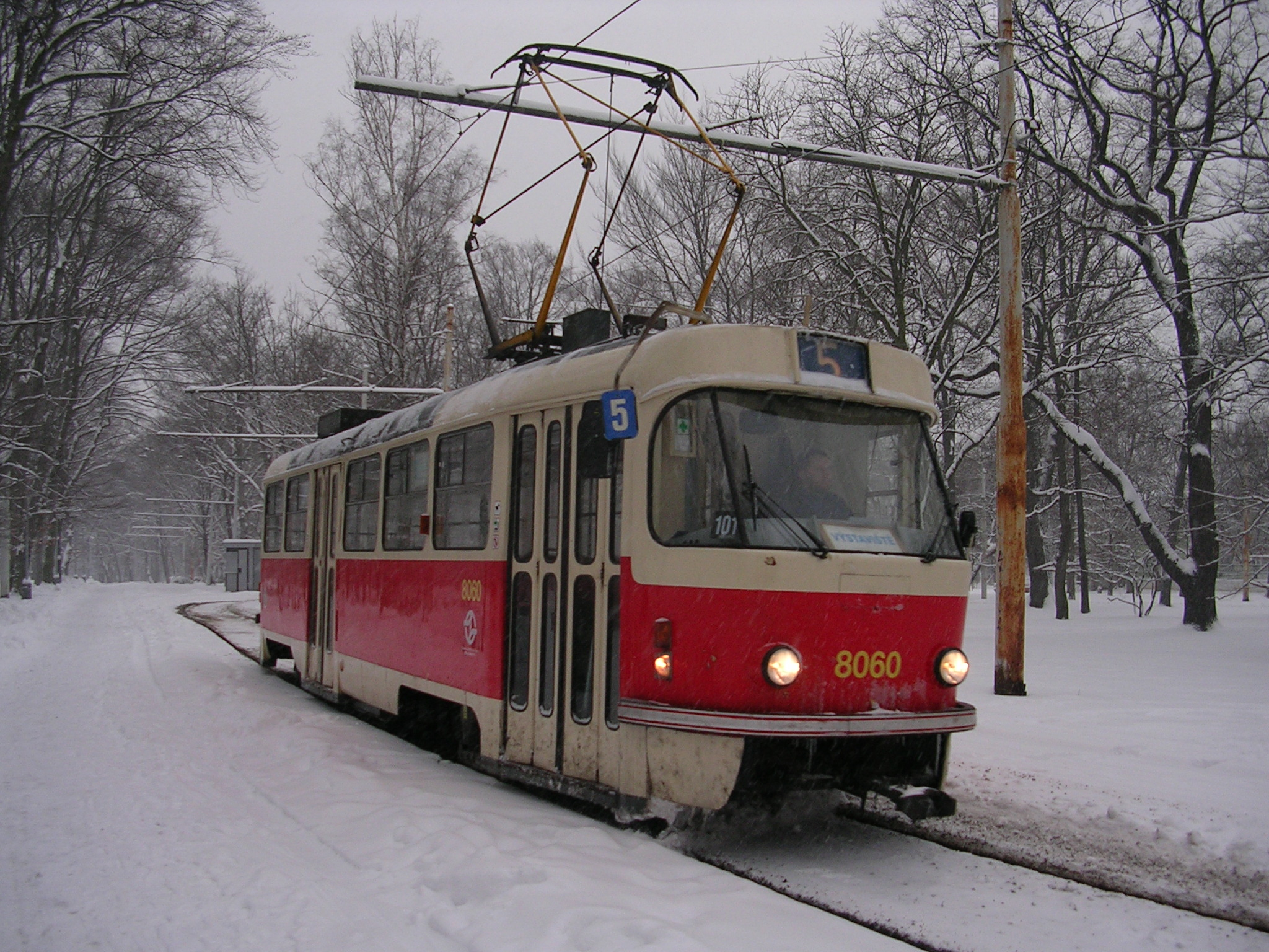 Tramvaj Tatra T3M v Praze na Výstavišti.